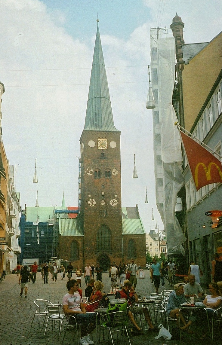 Århus Domkirke, Århus Domsogn, Århus Kommune